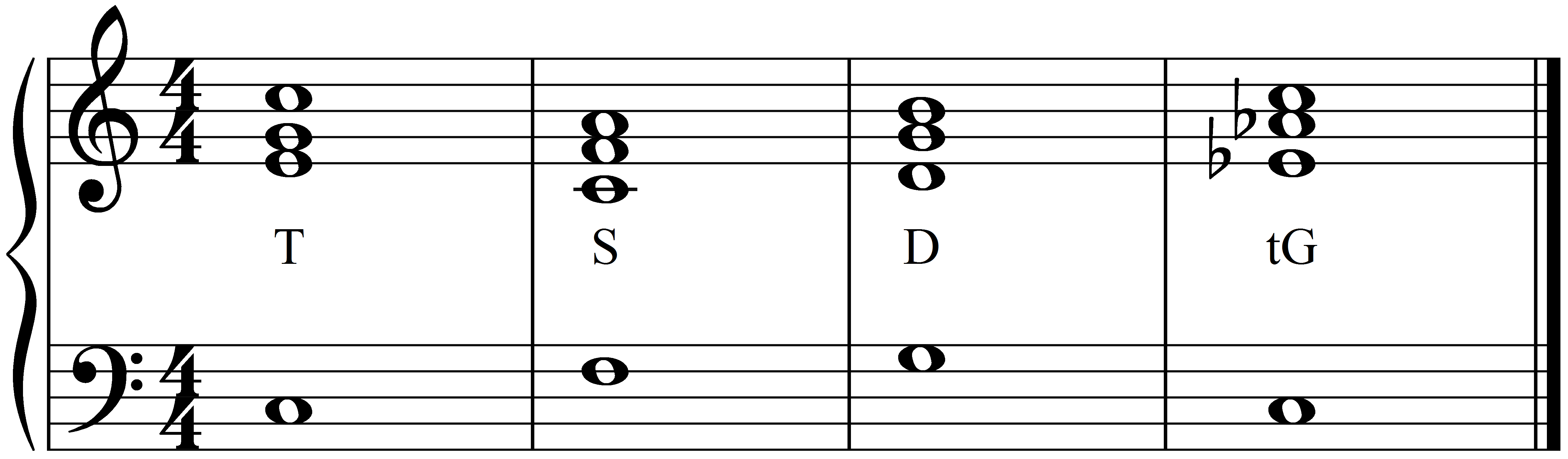 Trugschluss